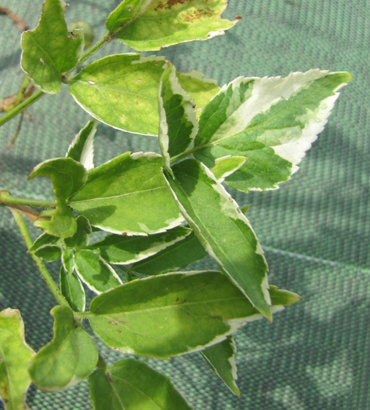 Jeune sureau aux feuilles panachées